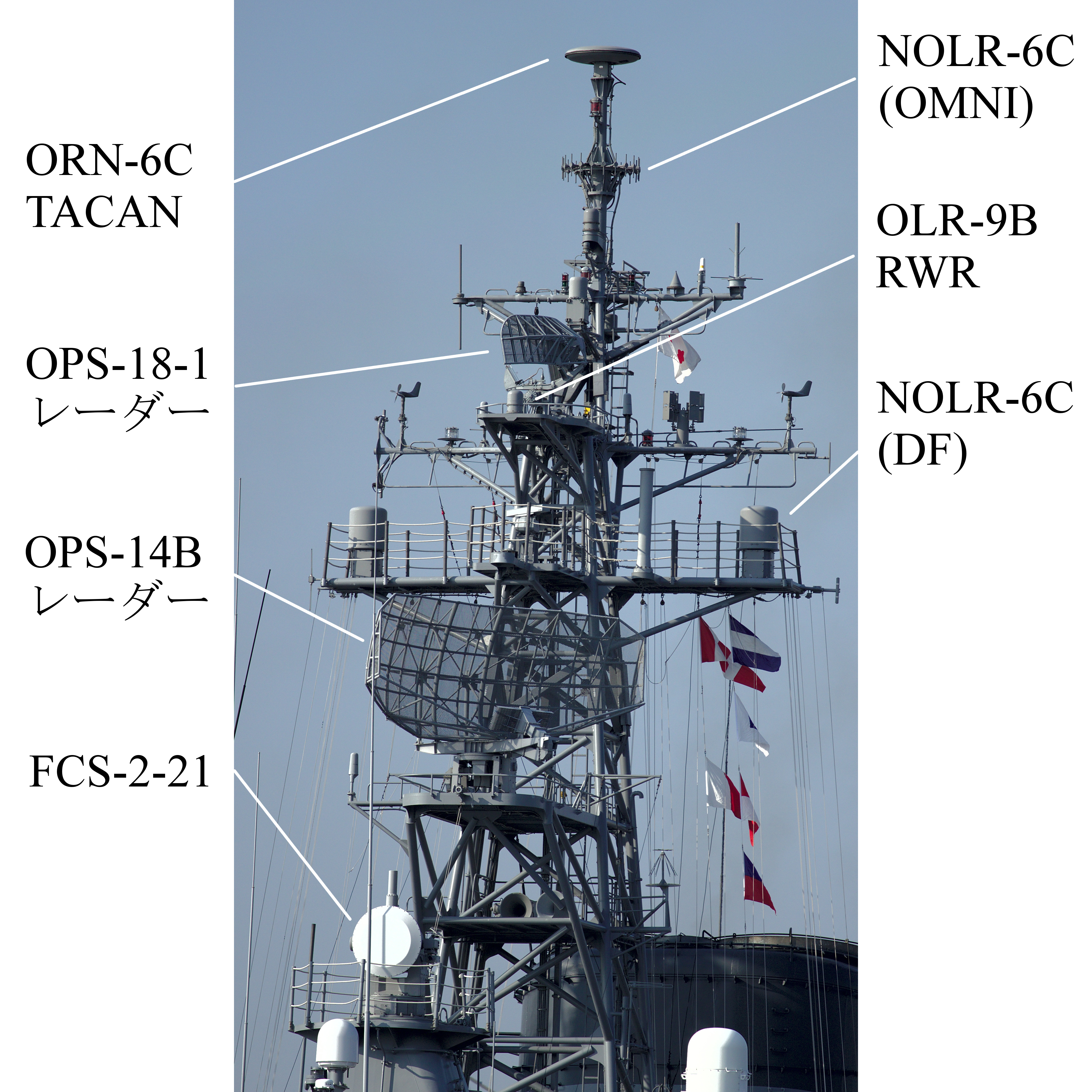 File:Радарные установки (9439252237).jpgを元に説明を追加したものです。